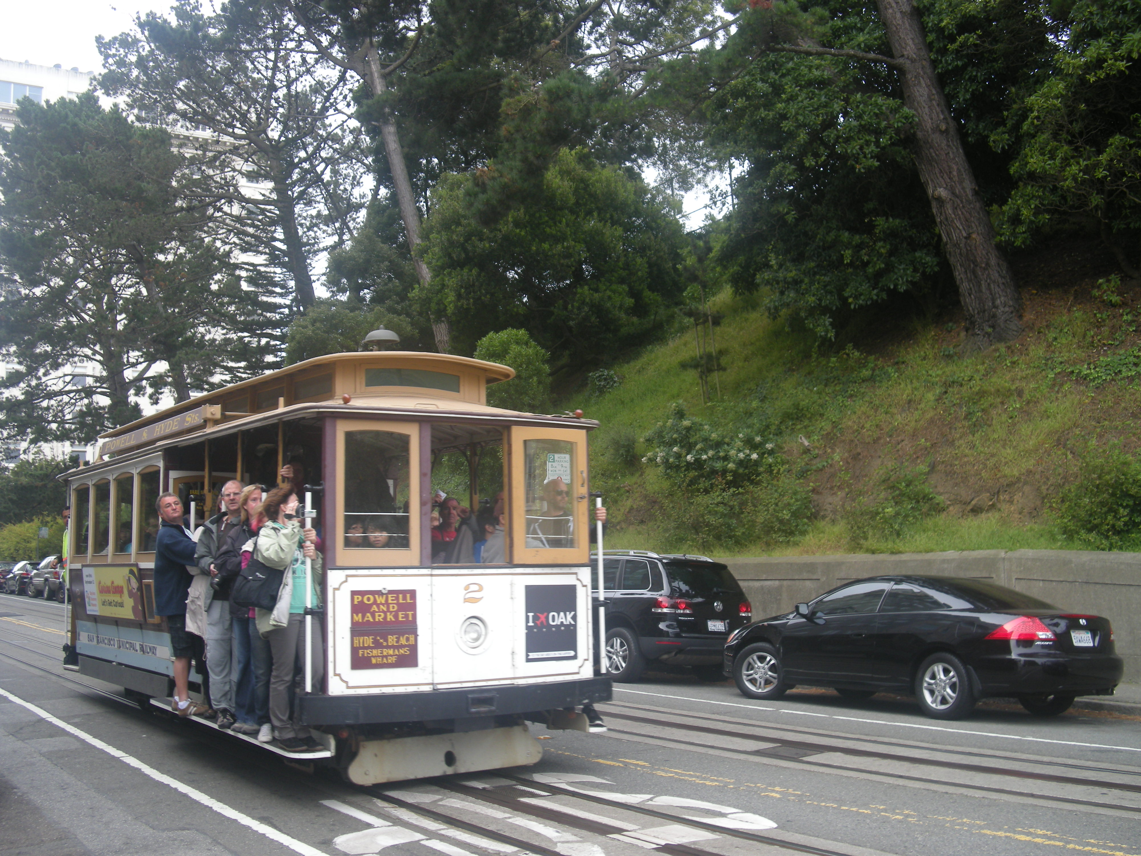 旧金山的缆车，于九曲花街的顶部拍摄